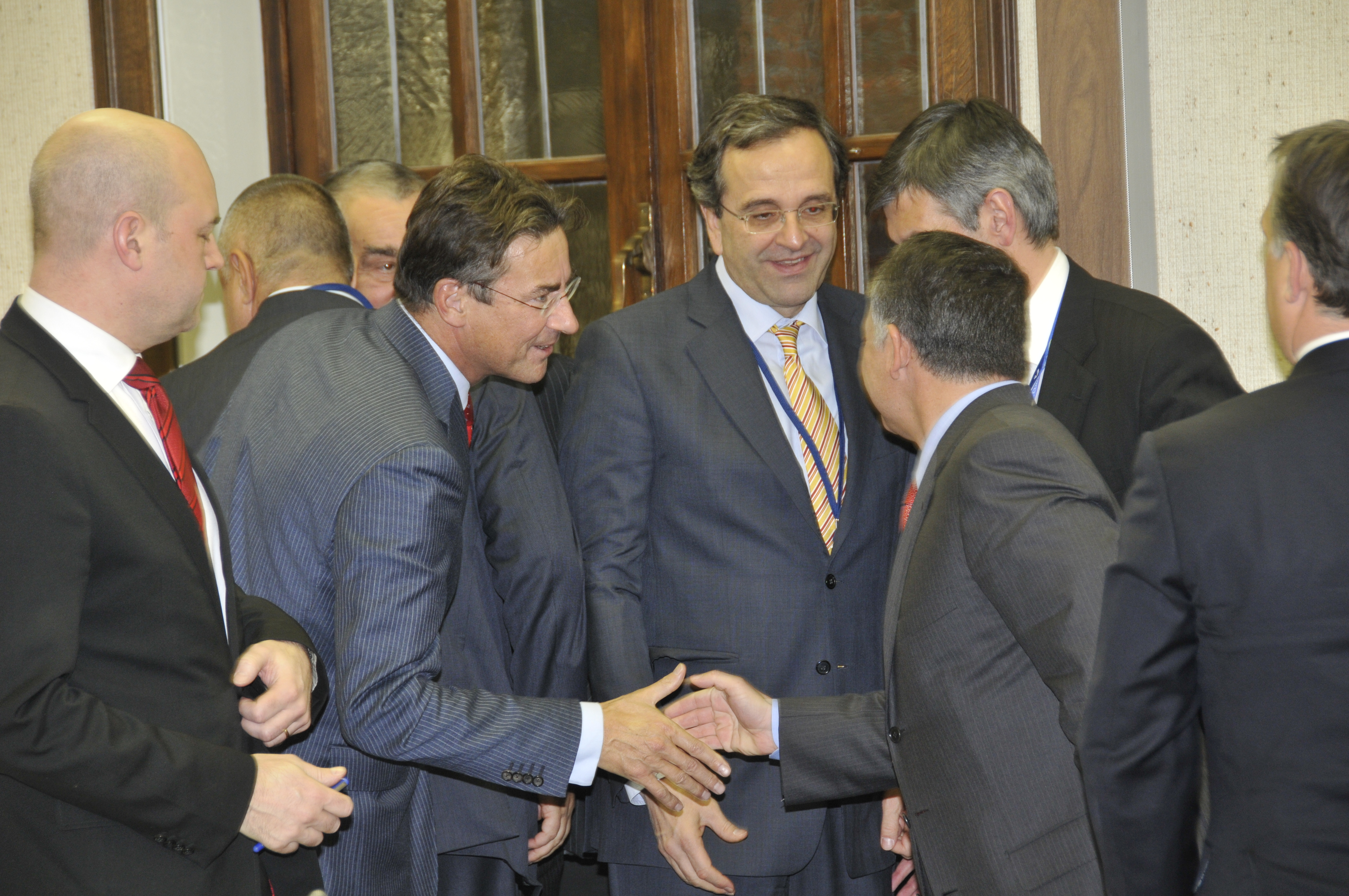 EPP Summit December 2010